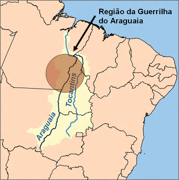 Mapa com indicador da região da Guerrilha do Araguaia. Baseado neste arquivo, presente no Commons.